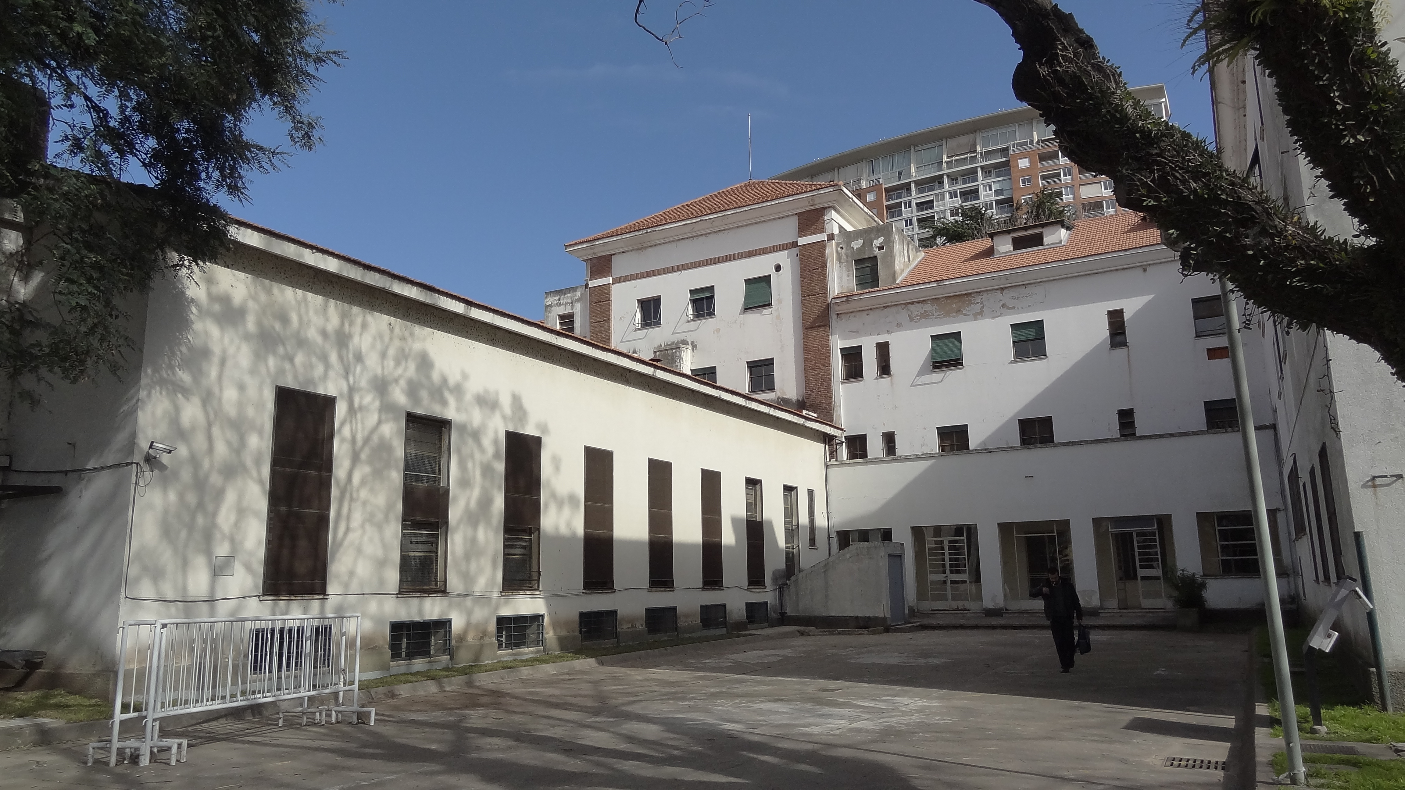 Visita guiada al CCD exESMA.